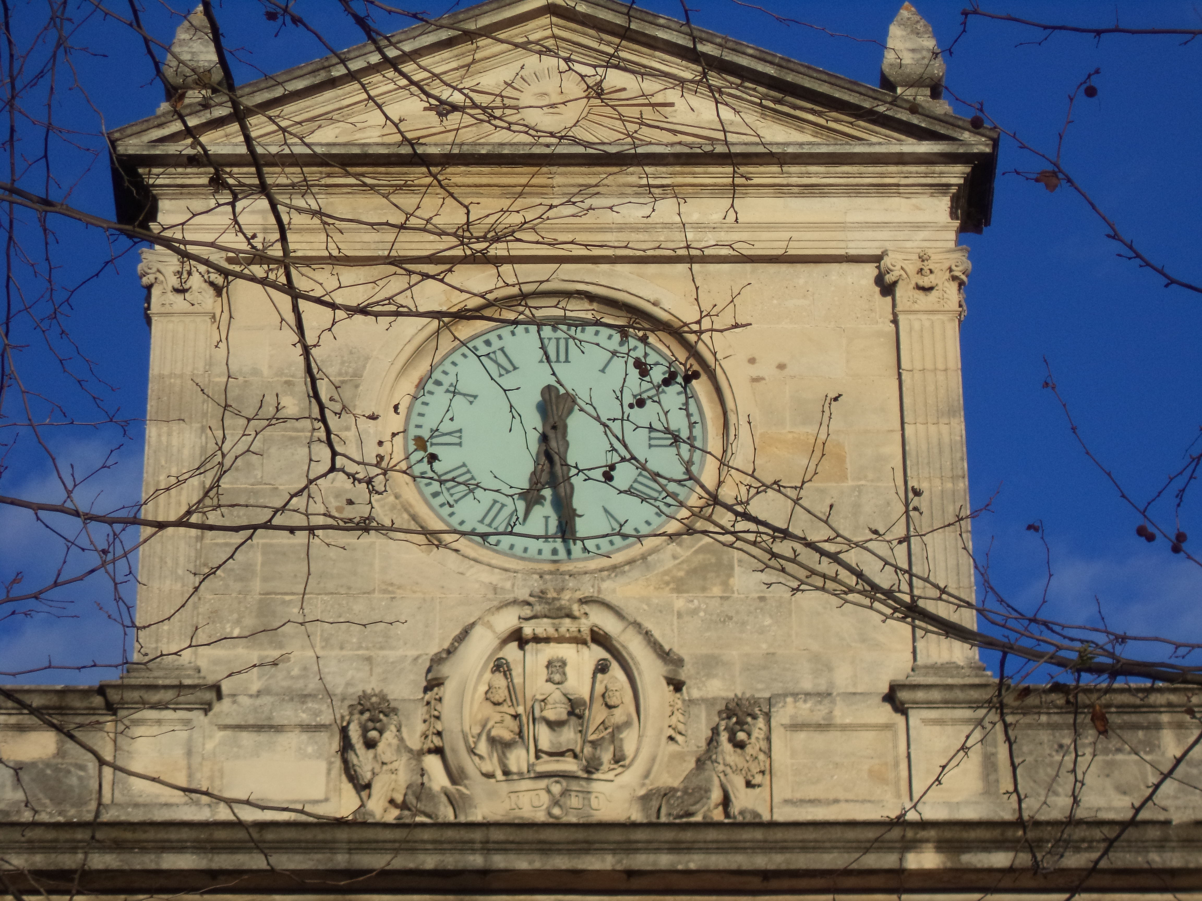 Reloj del Ayuntamiento de Sevilla en su fachada a la Plaza Nueva. Dicho reloj posee un escudo flanqueado por dos leones. El escudo muestra a San Fernando con San Isidoro y San Leandro. En la parte inferior está el símbolo del NO8DO